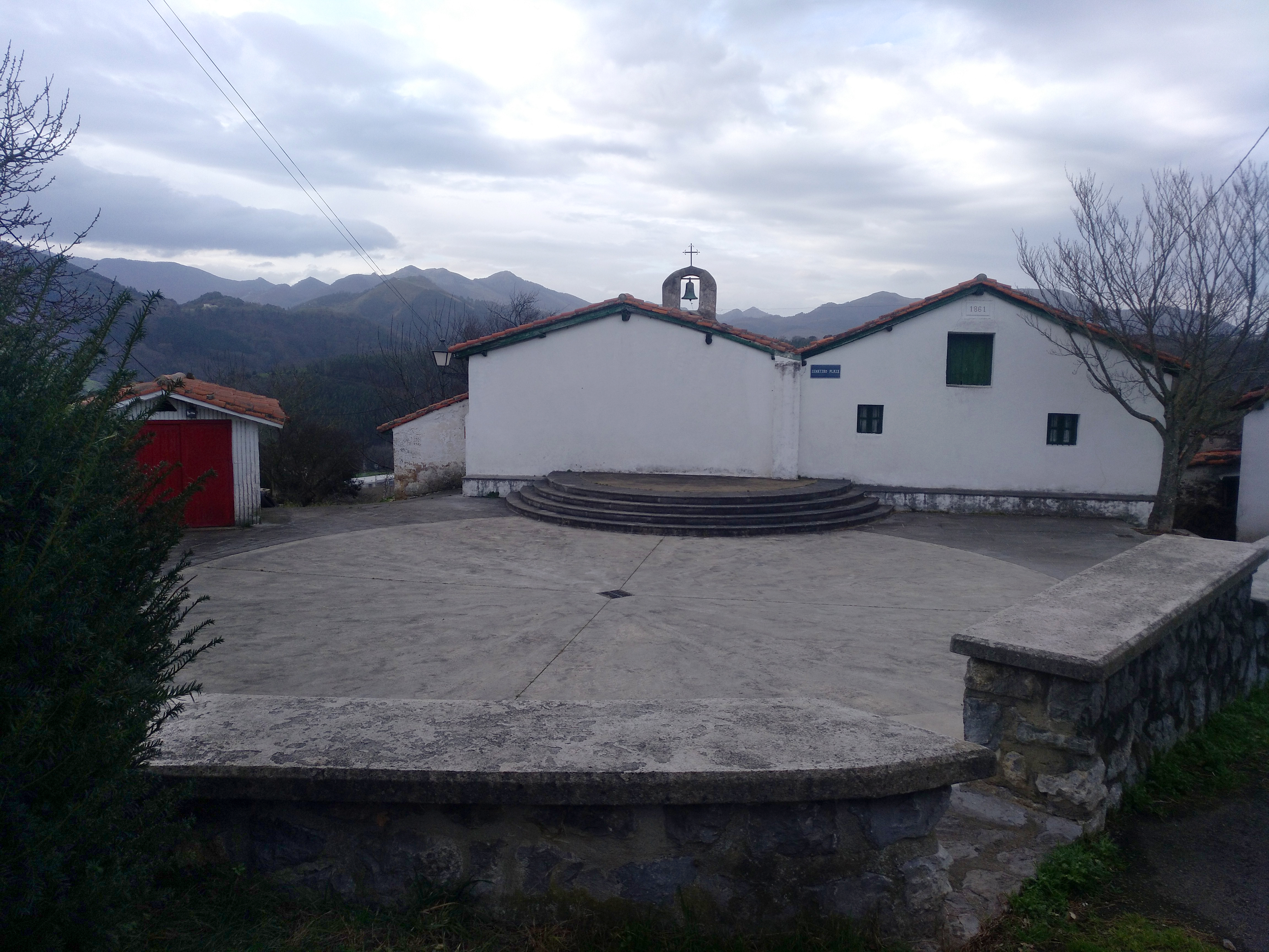 Aizarnazabalgo Saiatz auzoa